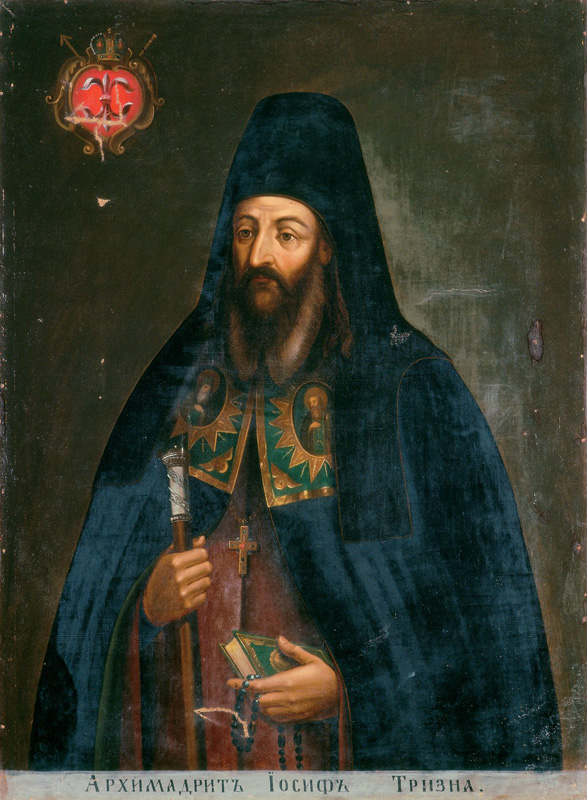 Беларуская (тарашкевіца): Партрэт Язэпа Трызны (Jazep Tryzna)